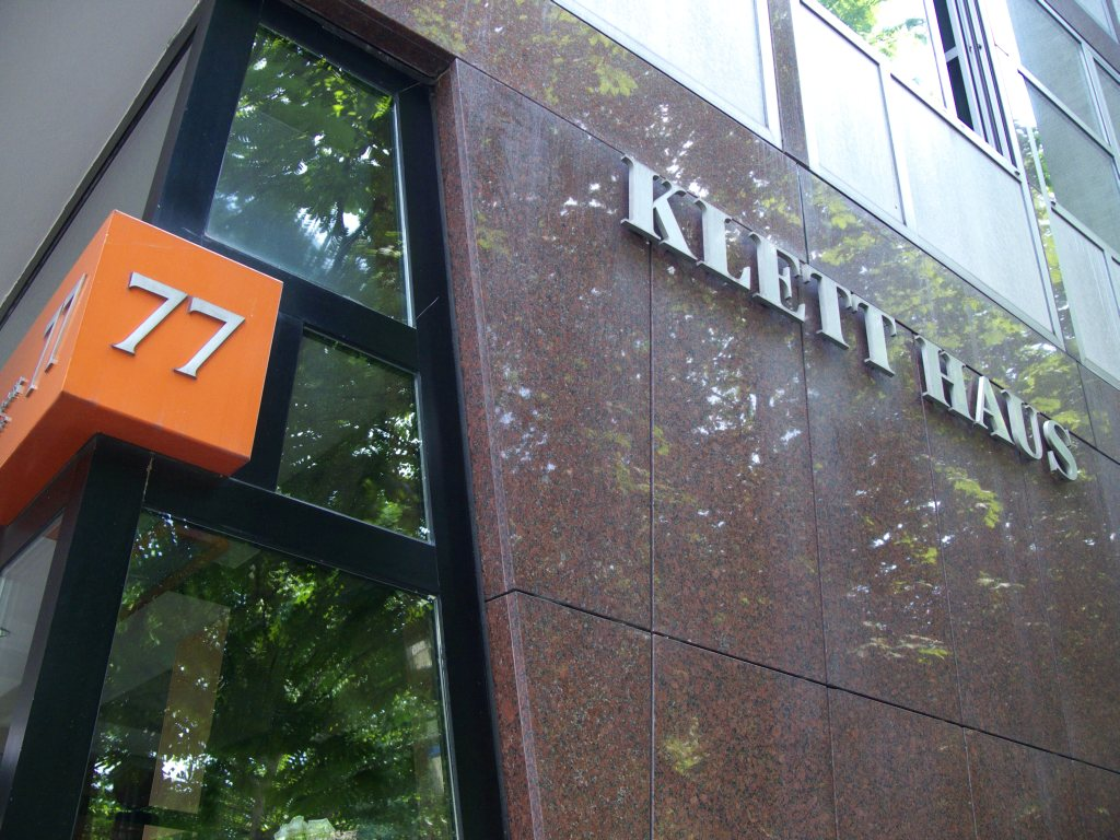 Haupteingang Ernst Klett AG Rotebühlstraße